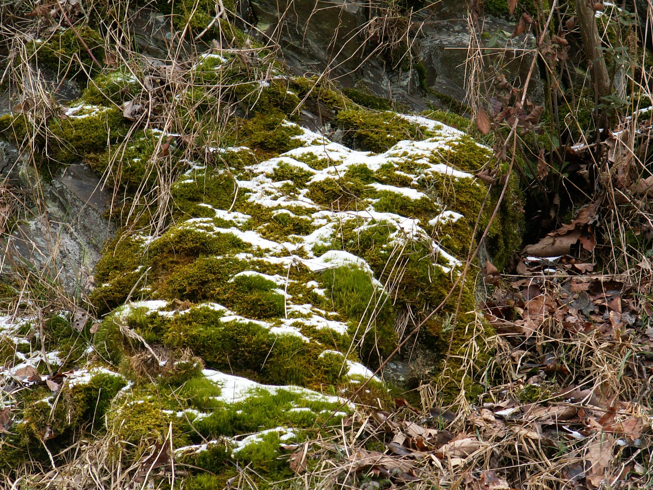 Dicranum scoparium